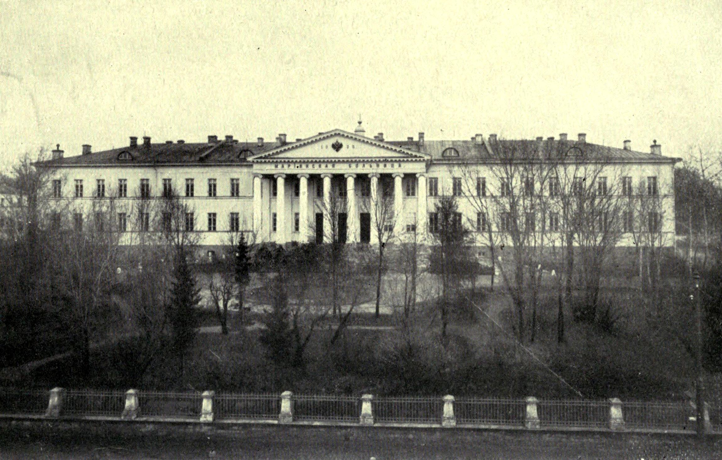 Мариинская больница для бедных в Москве, Божедомка.